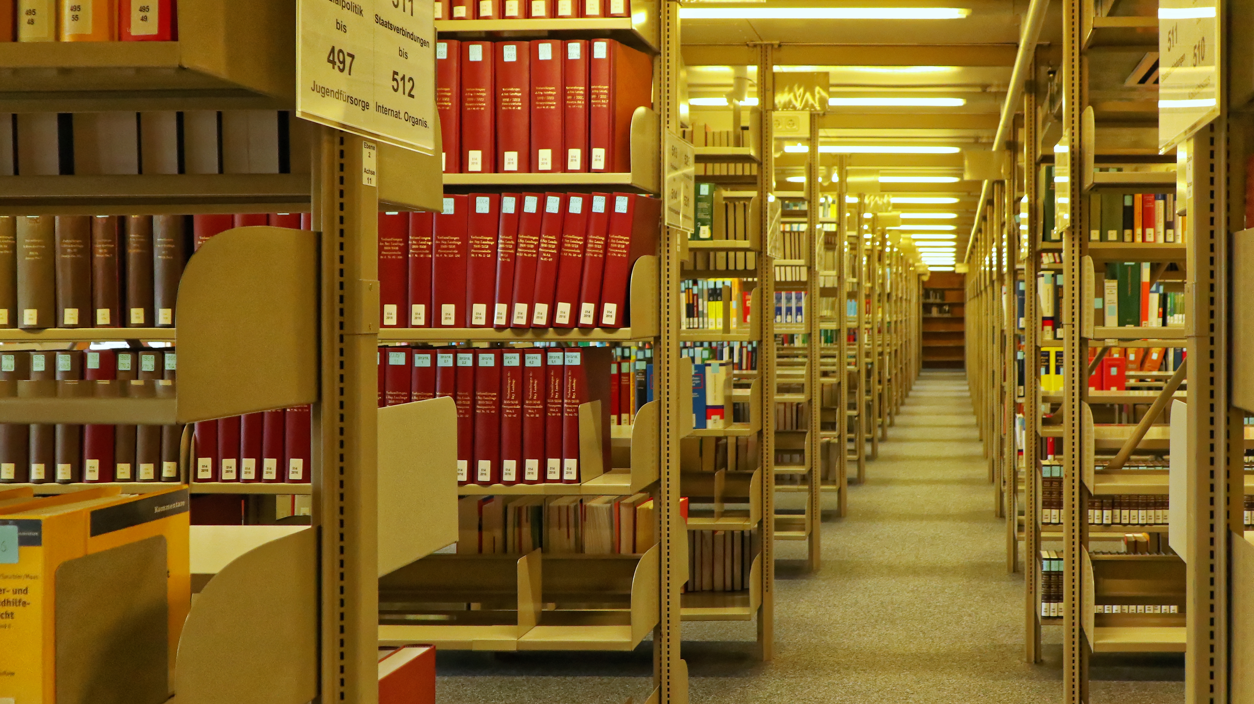 Bücherregale im Abholbereich der Bayerischen Staatsbibliothek im Bereich der Lesesäle